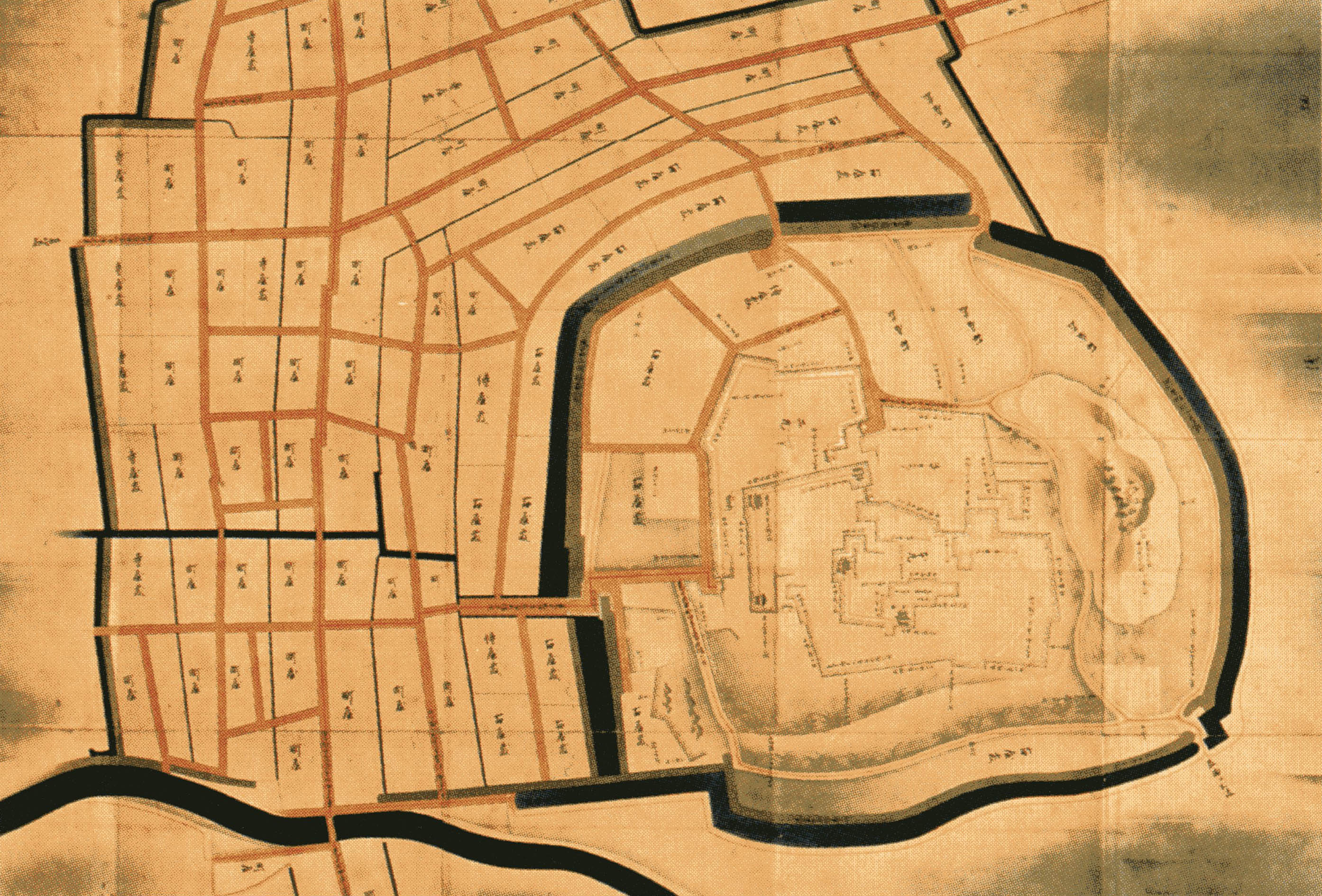 伊勢国松坂古城之図